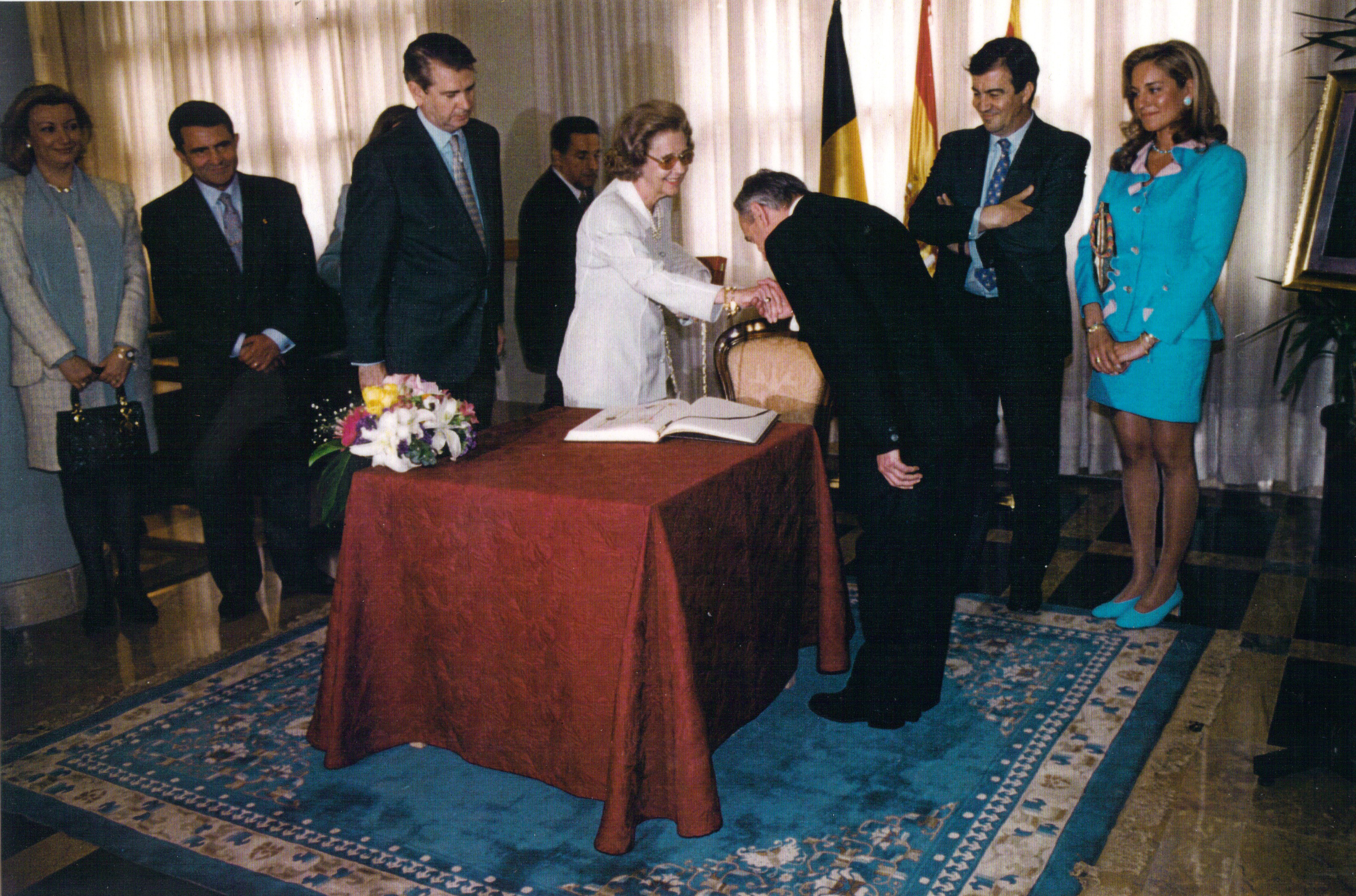 Ruizanglada recibe la Medalla al Merito Cultural en 1992 de manos de la Reina Fabiola y ante Francisco Alvarez Cascos